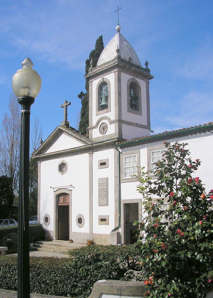 "Ramada Alta" chapel in Porto, Portugal